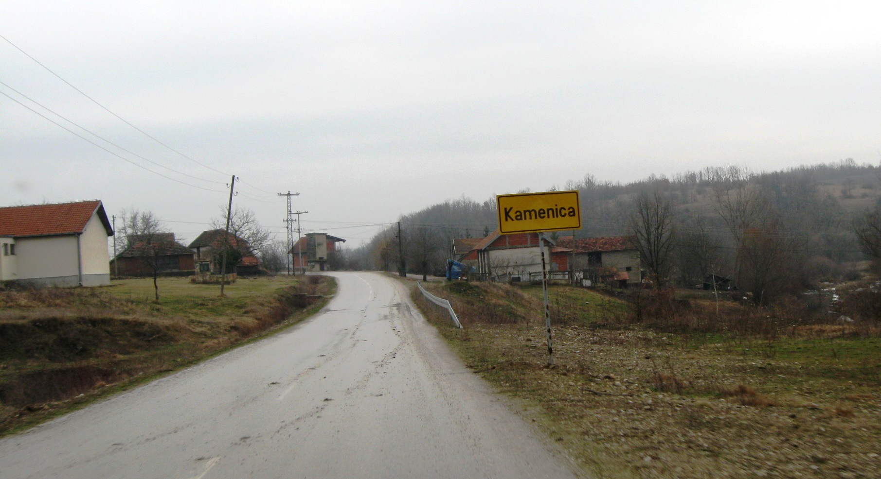 Kamenica, Bojnik